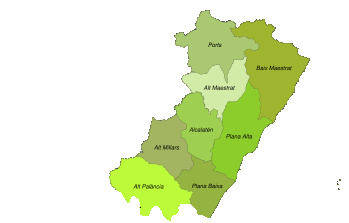 Mapa comarcal de la provincia de Castellón